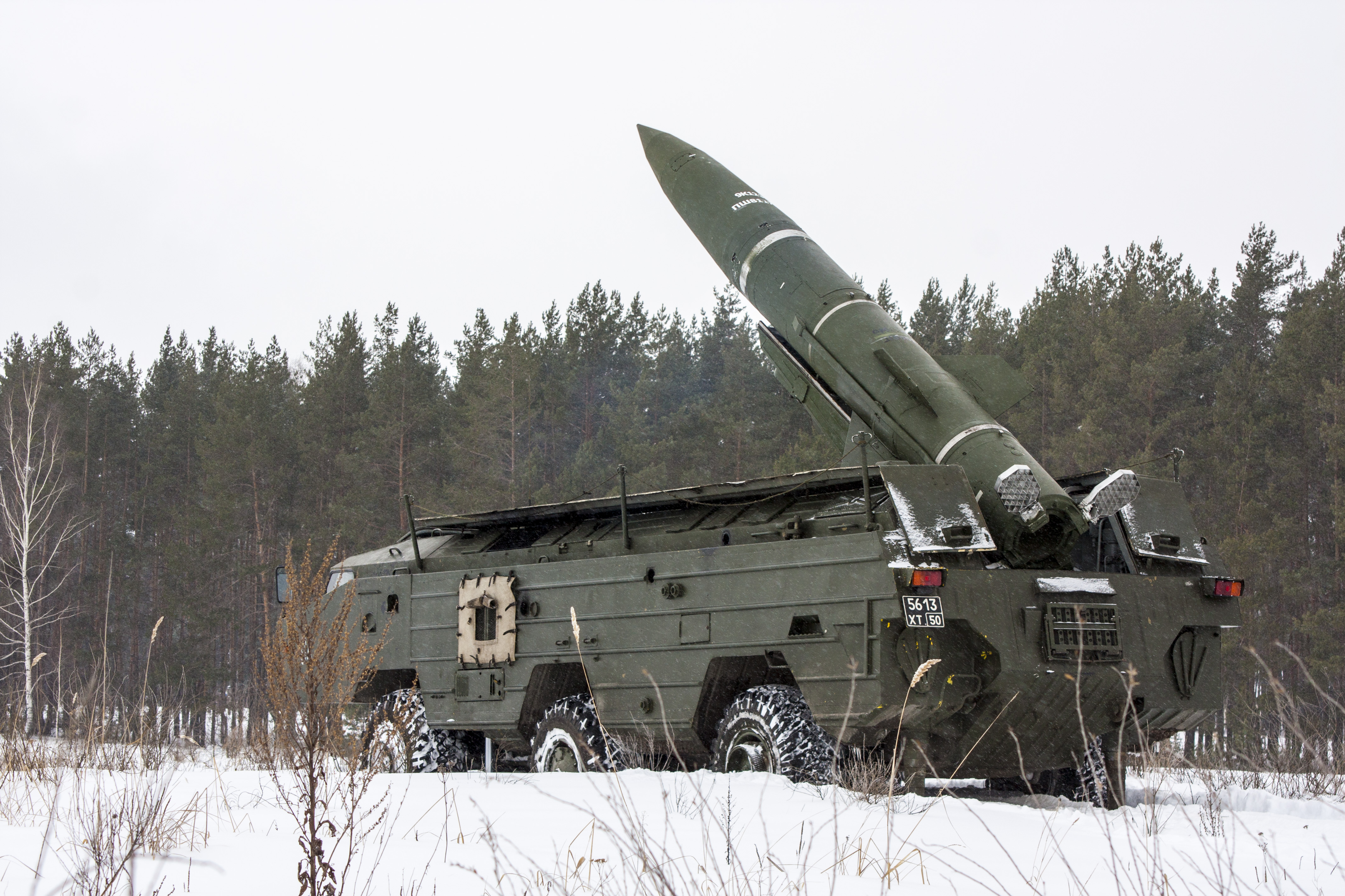 Учение подразделений 448-й ракетной бригады с 27-й отдельной бригадой РХБ защиты по ликвидации последствий условного химического заражения в Курской области.